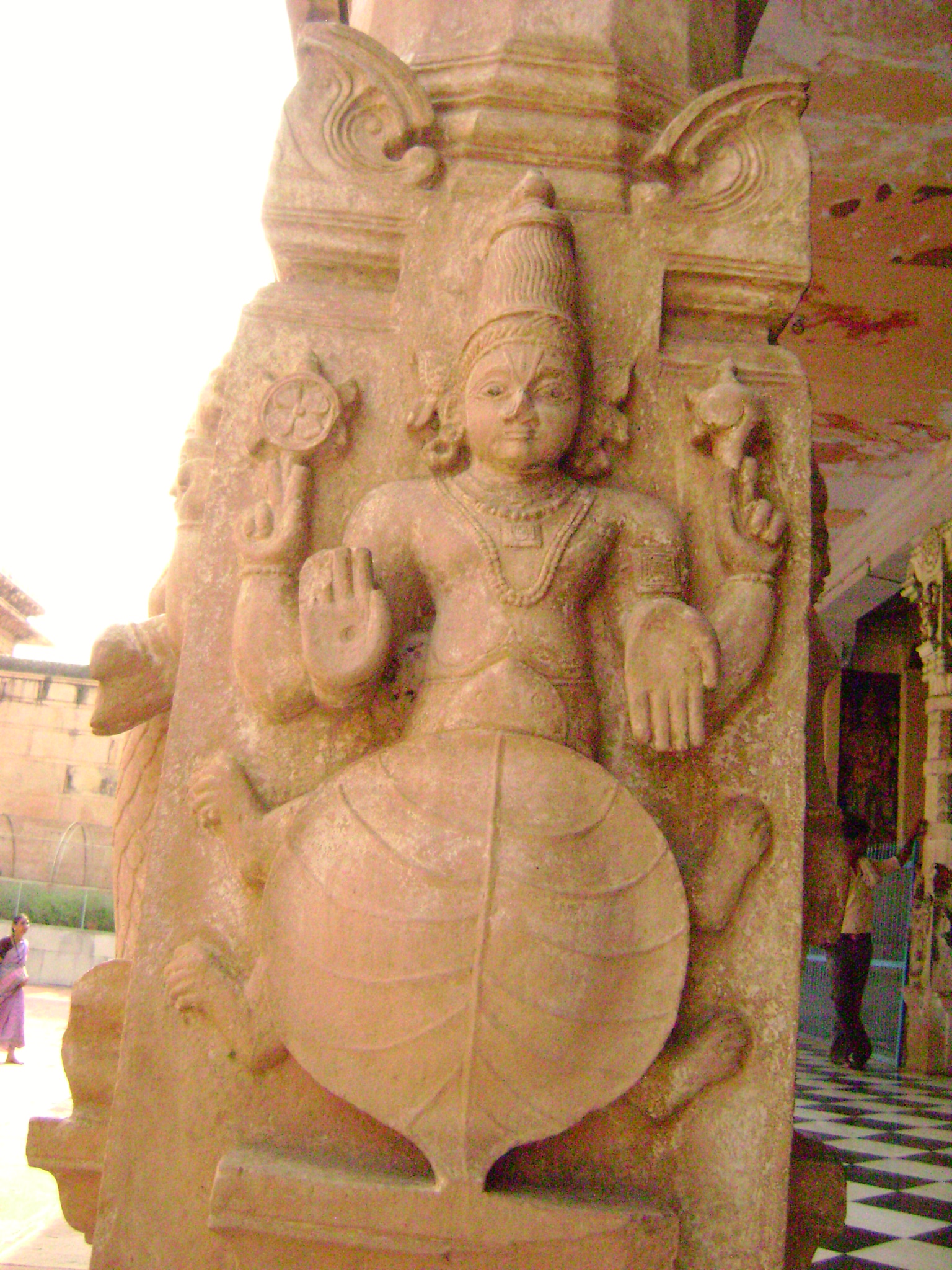 Koorma (Tortoise) Avatar of Lord Vishu